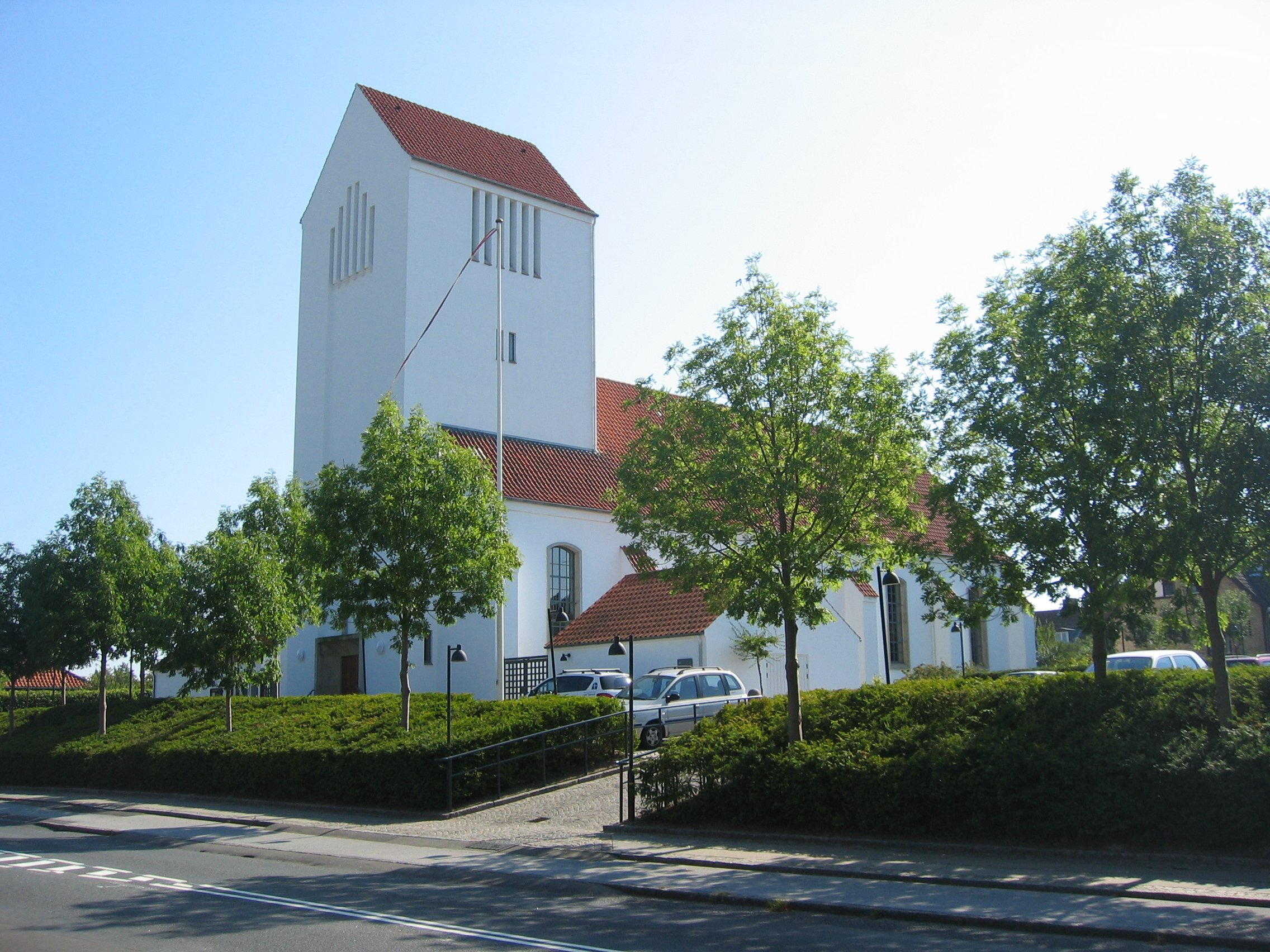 Dyssegård Kirke, Dyssegård Sogn, Sokkelund Herred, Københavns Amt, Danmark. Author: Klaus Alexander Seistrup Date: 2005-09-06